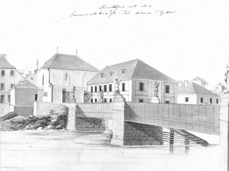 pohled přes řeku Ohři